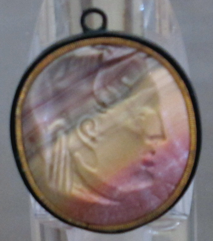 Arte ellenistica, alessandro d'epiro, agata, 260 ac. ca